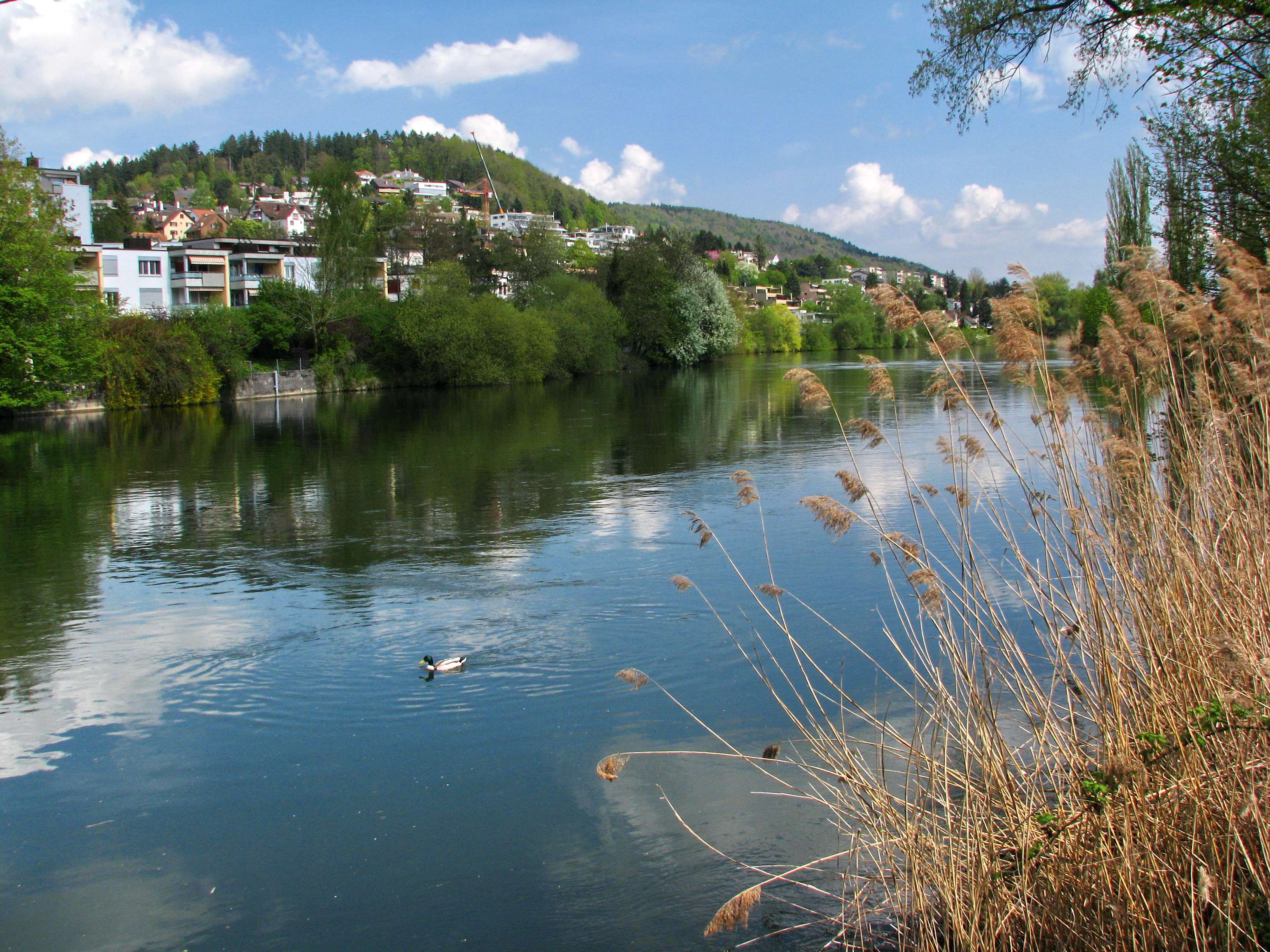 Limmat in Oetwil an der Limmat